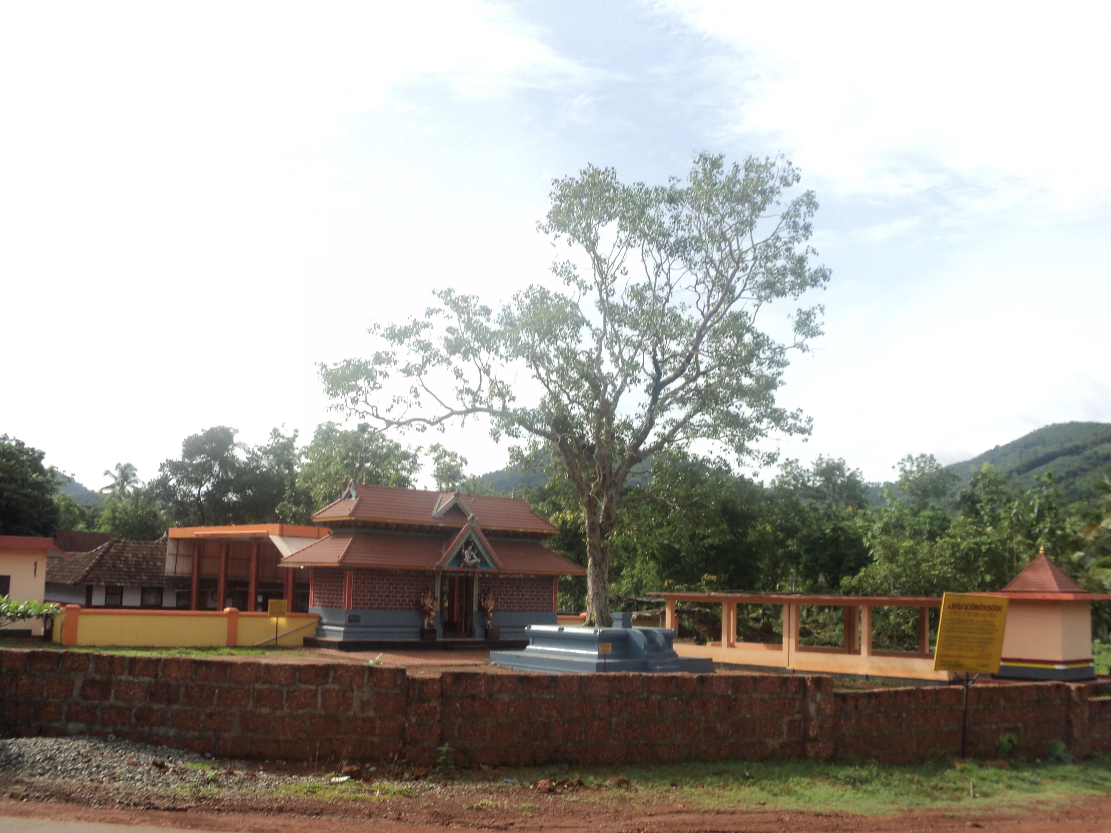 ക്ഷേത്രാങ്കണം - അരയാലും നടപ്പന്തലും